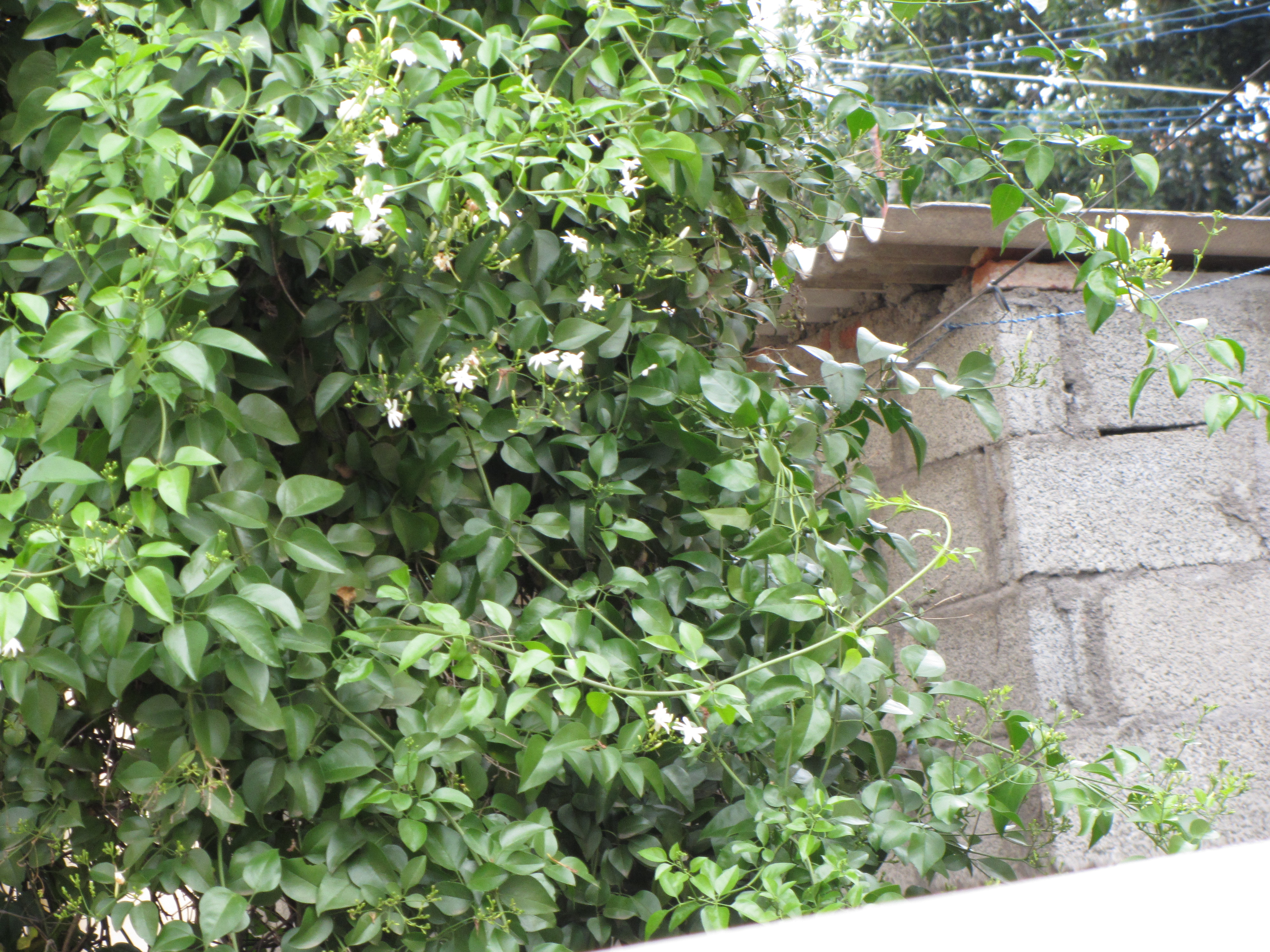 own shot கொடியில் முல்லைப்பூ